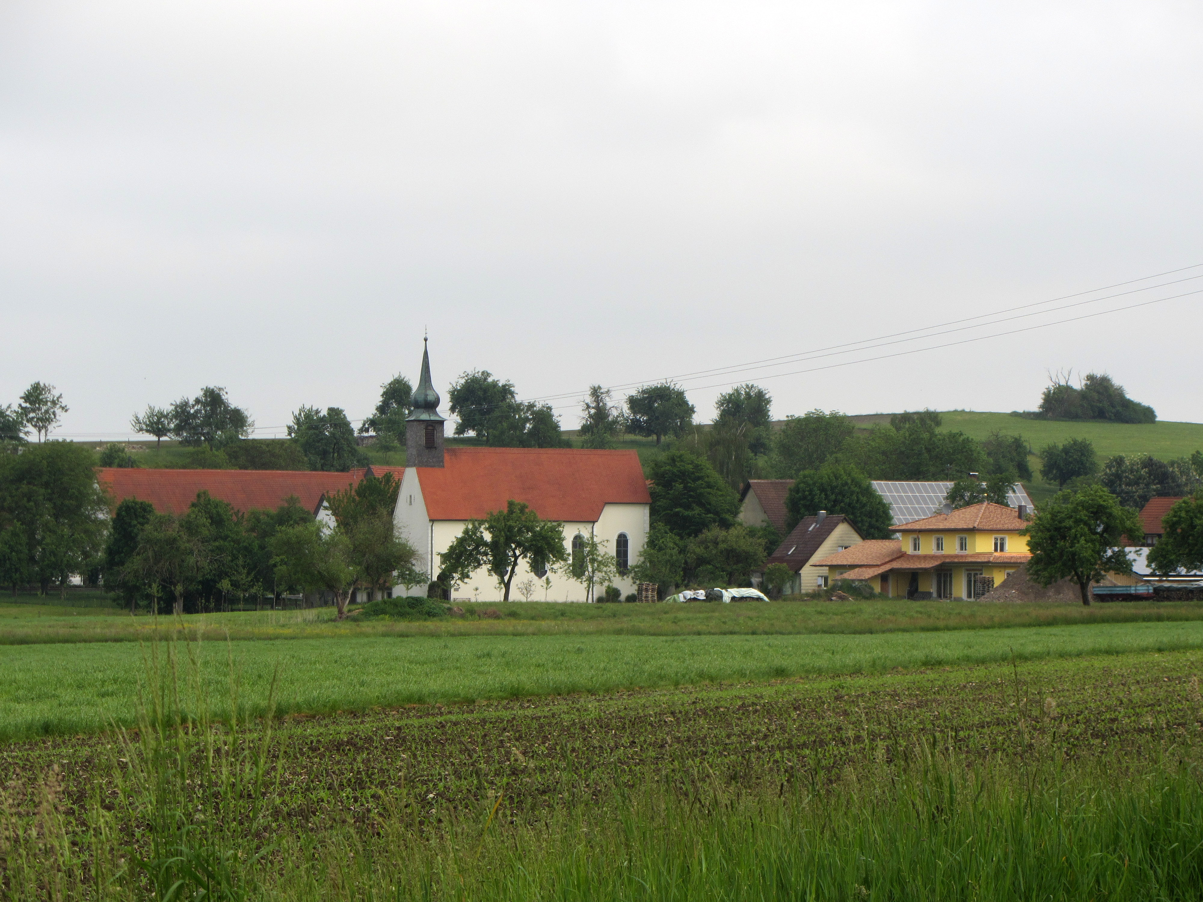 St. Georg zu Gwigg - Filialkirche der ehemaligen Reichabtei Rot an der Rot - Erbaut während der Regierungszeit von Abt Hermann Vogler